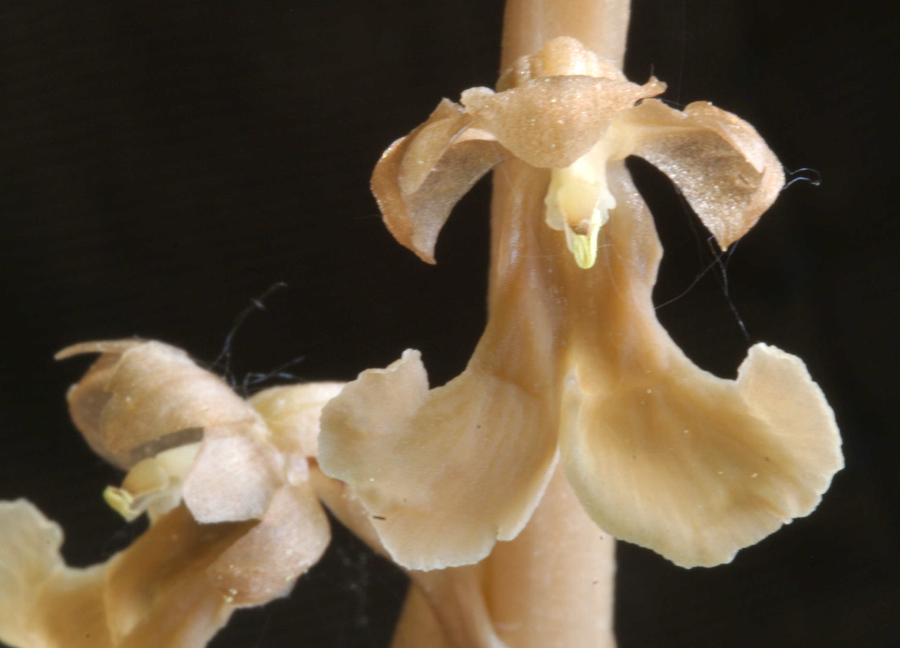 Neottia nido d'uccello - Località: Melere, Trichiana (BL), 843 m s.l.m.